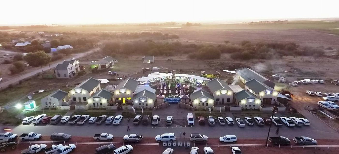 Orania se Brouers- en Stokersfees